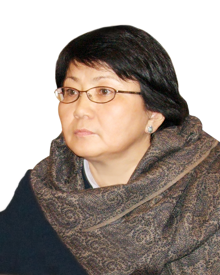 Roza Otunbaeva